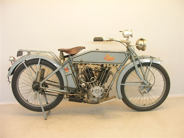 Pope L14 1000 cc motorcycle from 1914.